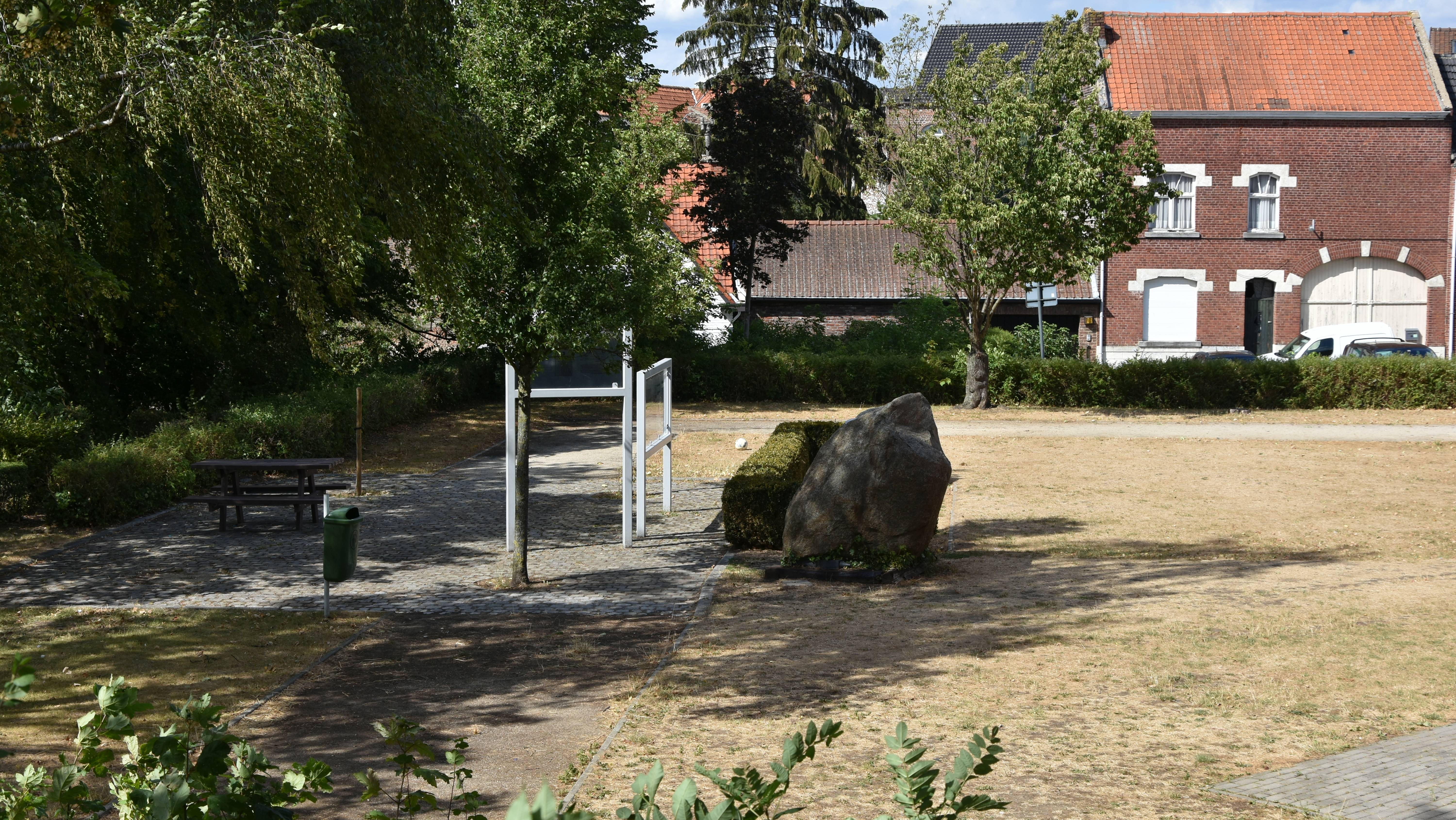 Locatie burcht van Loon Borgloon 10-08-2018 This photo of immovable heritage has been taken in the Flemish Region